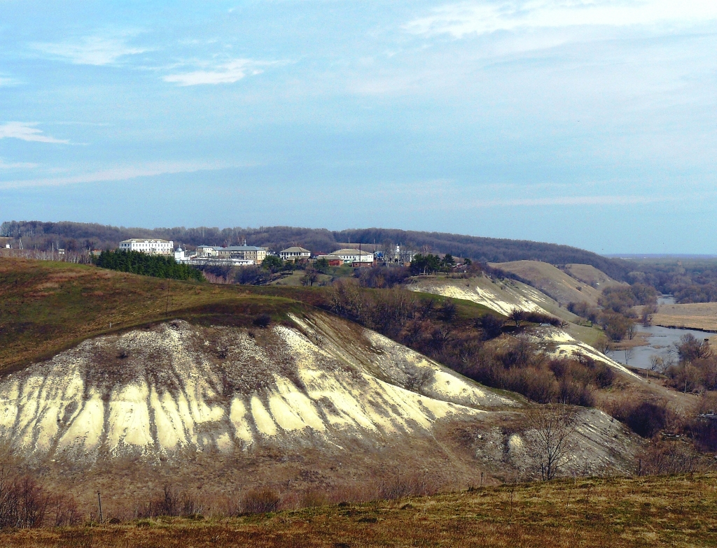 Горнальский Свято-Николаевский Белогорский мужской монастырь